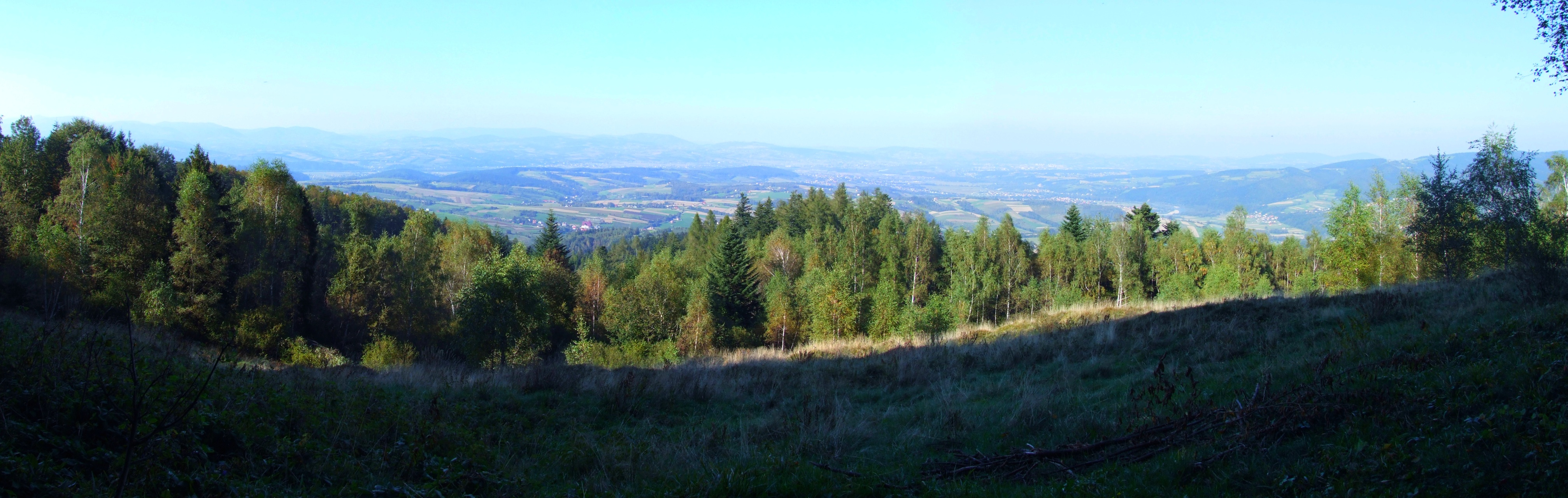 Polana Paszkowa (Mała Lachówka) w Paśmie Radziejowej Beskidu Sądeckiego